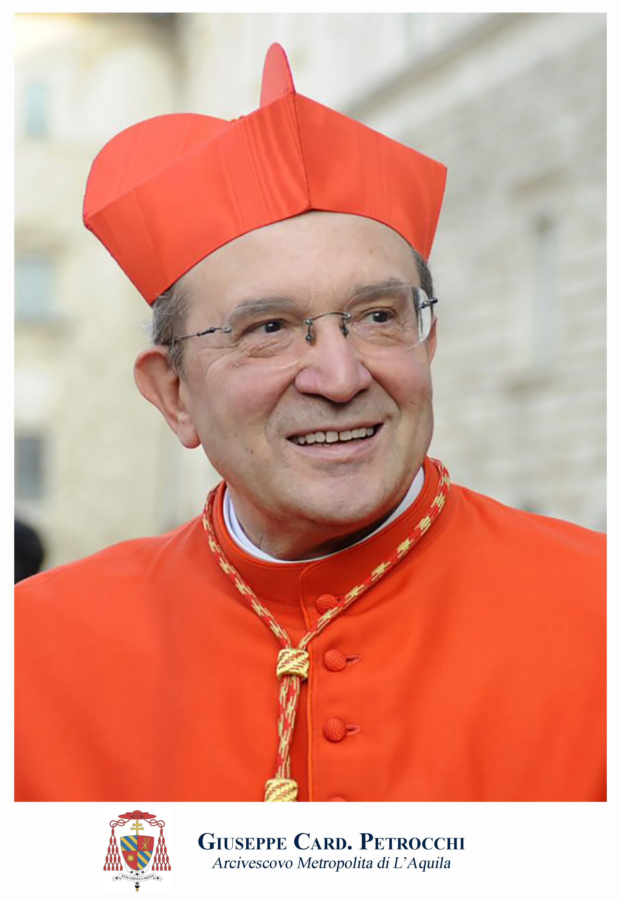 Foto ufficiale del Cardinale Giuseppe Petrocchi